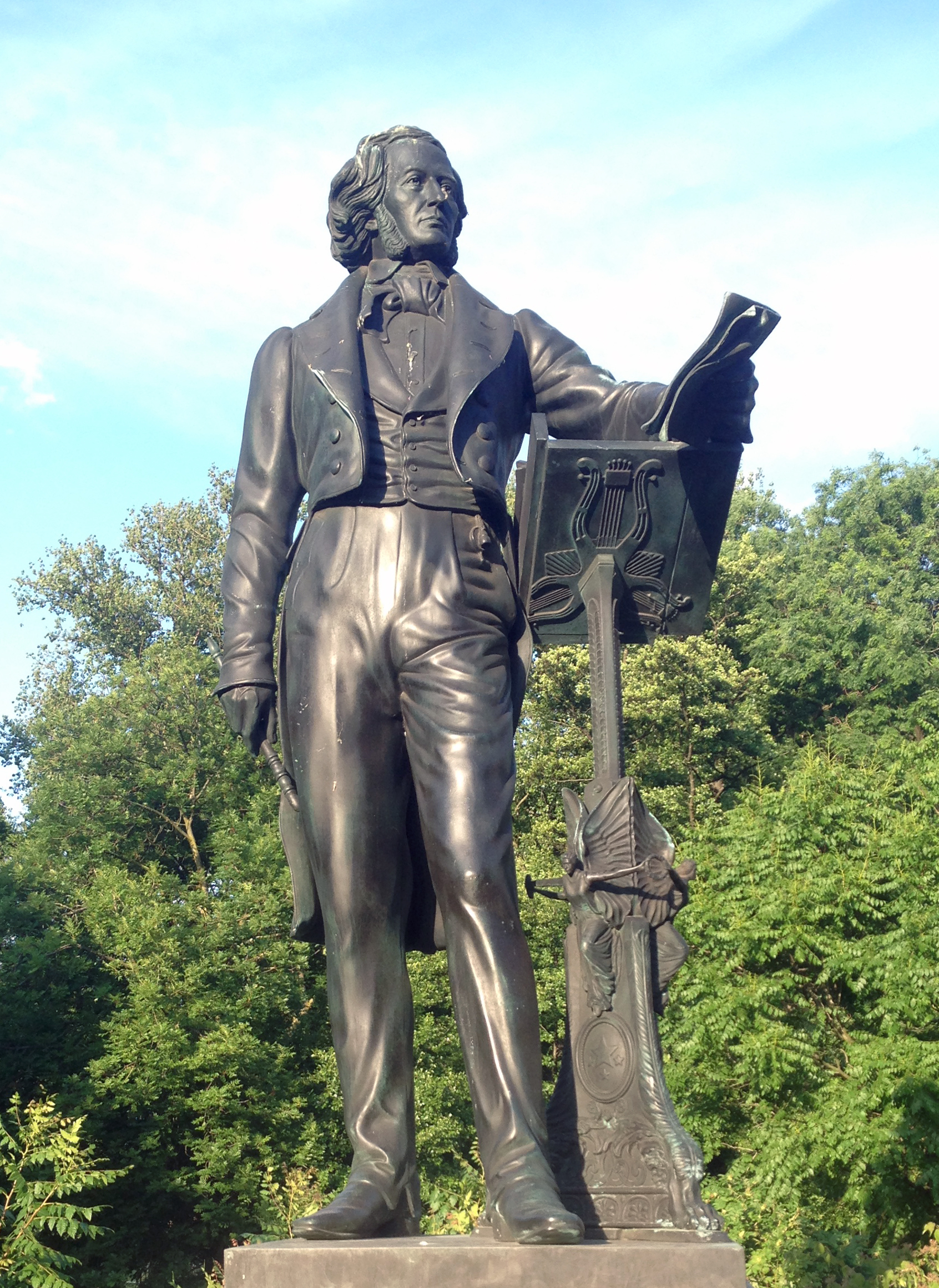 Düsseldorf, Felix Mendelssohn Bartholdy Denkmal, Musikdiretor von Düsseldorf 1833–1835 (2017)